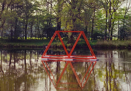 Vom Fotografen frei gegebene Abbildung einer Skulptur von Ursula Hirsch von 1989 (Zustimmung des Fotografen schriftlich vorhanden)